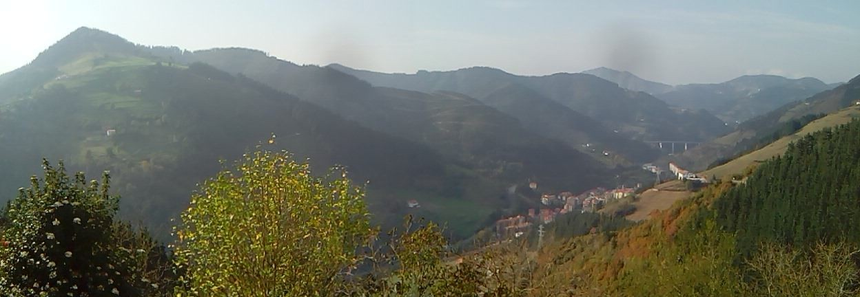 Soraluze Txurrukatik begiratuta